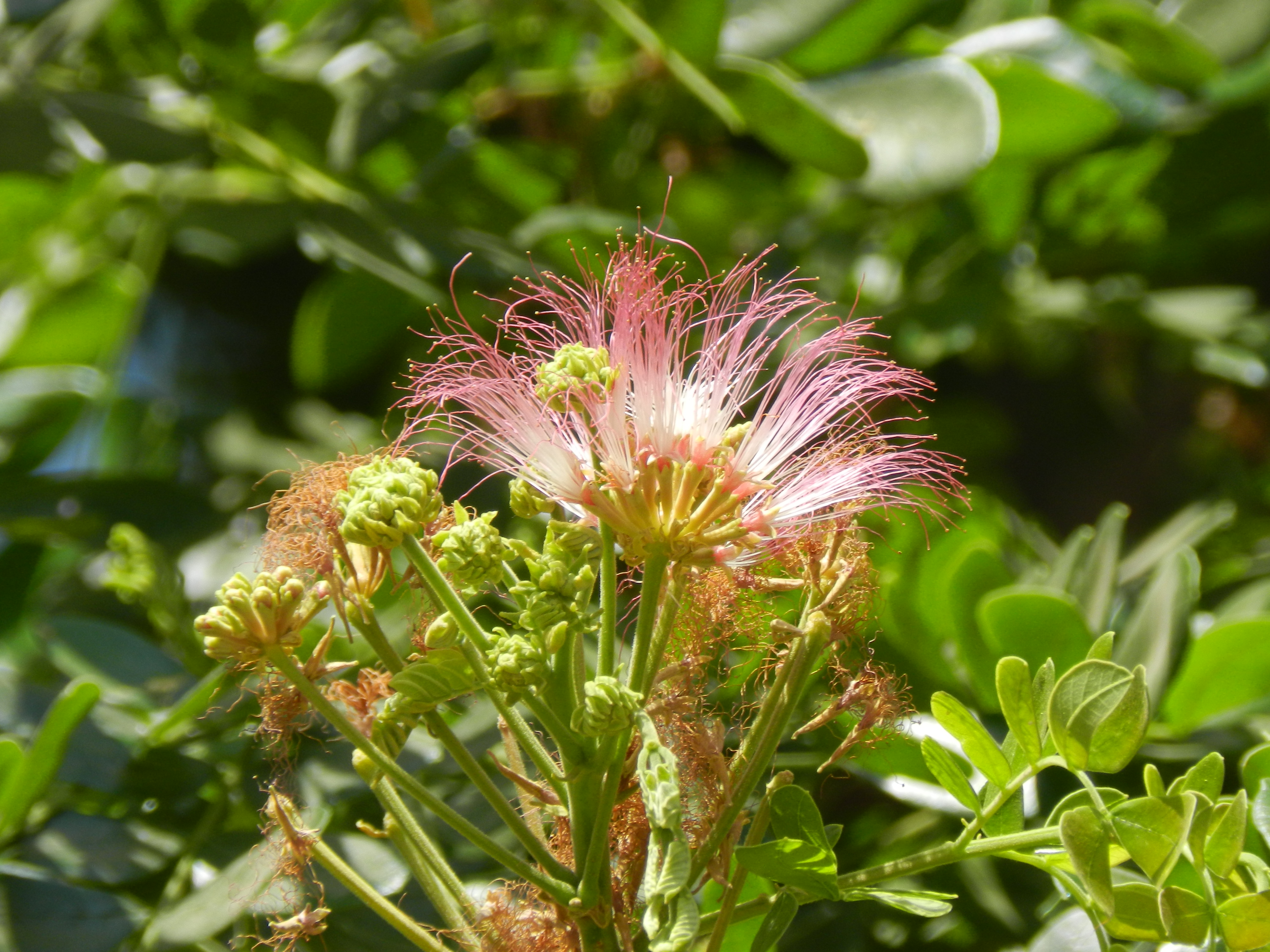 पर्जन्यवृक्ष फुले